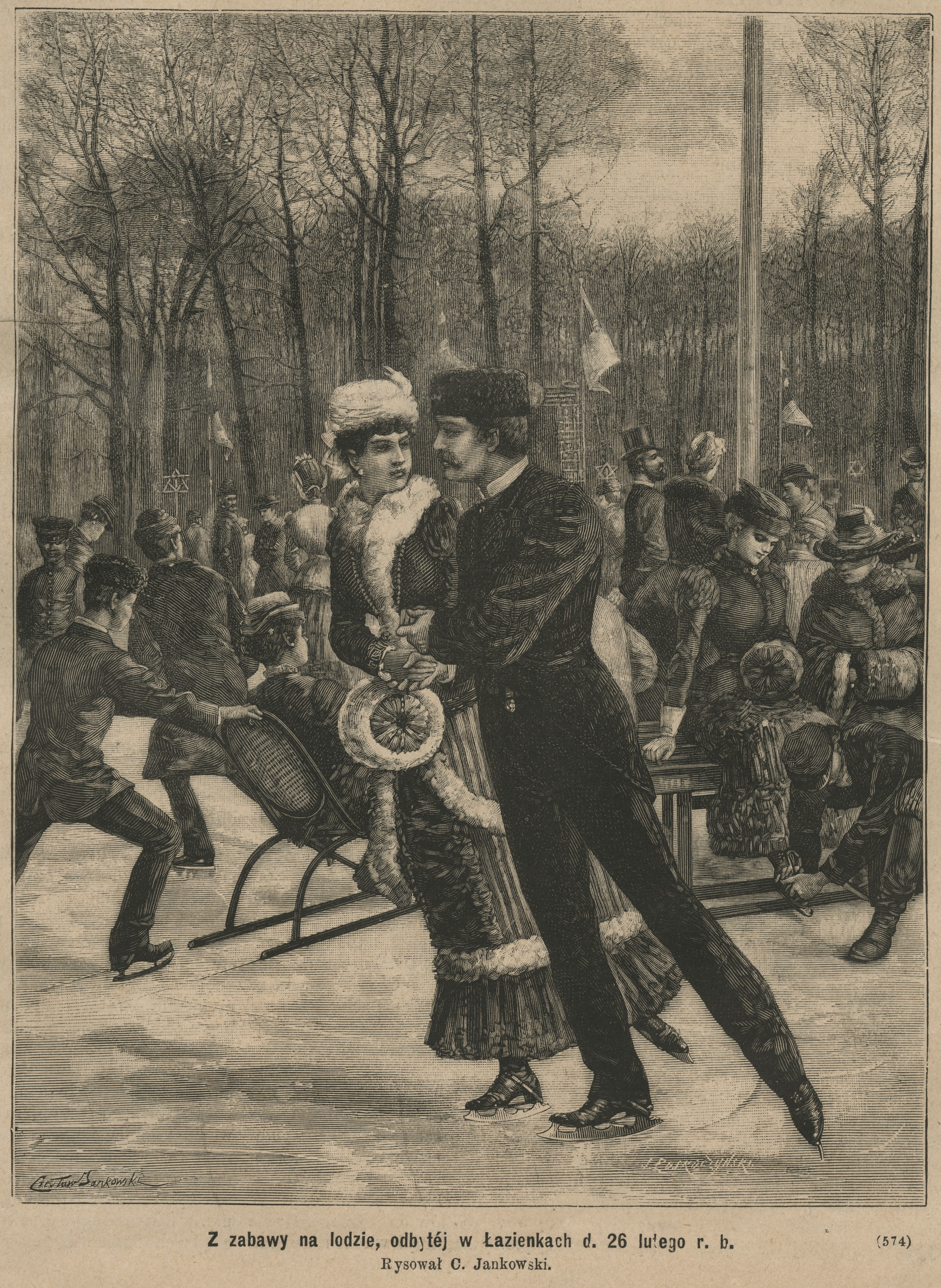 Z zabawy na lodzie odbytej d. 26 lutego r. b. : Rysował C. Jankowski